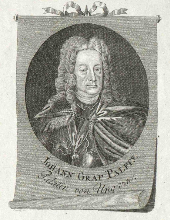 Gróf erdődi Pálffy (III.) János Bernard István (Vöröskő vára, 1663. augusztus 20. – Pozsony, 1751. március 24.) magyar főúr, császári tábornagy, 1741-től halálig Magyarország nádora